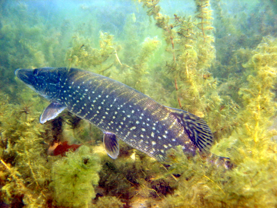 Щука звичайна